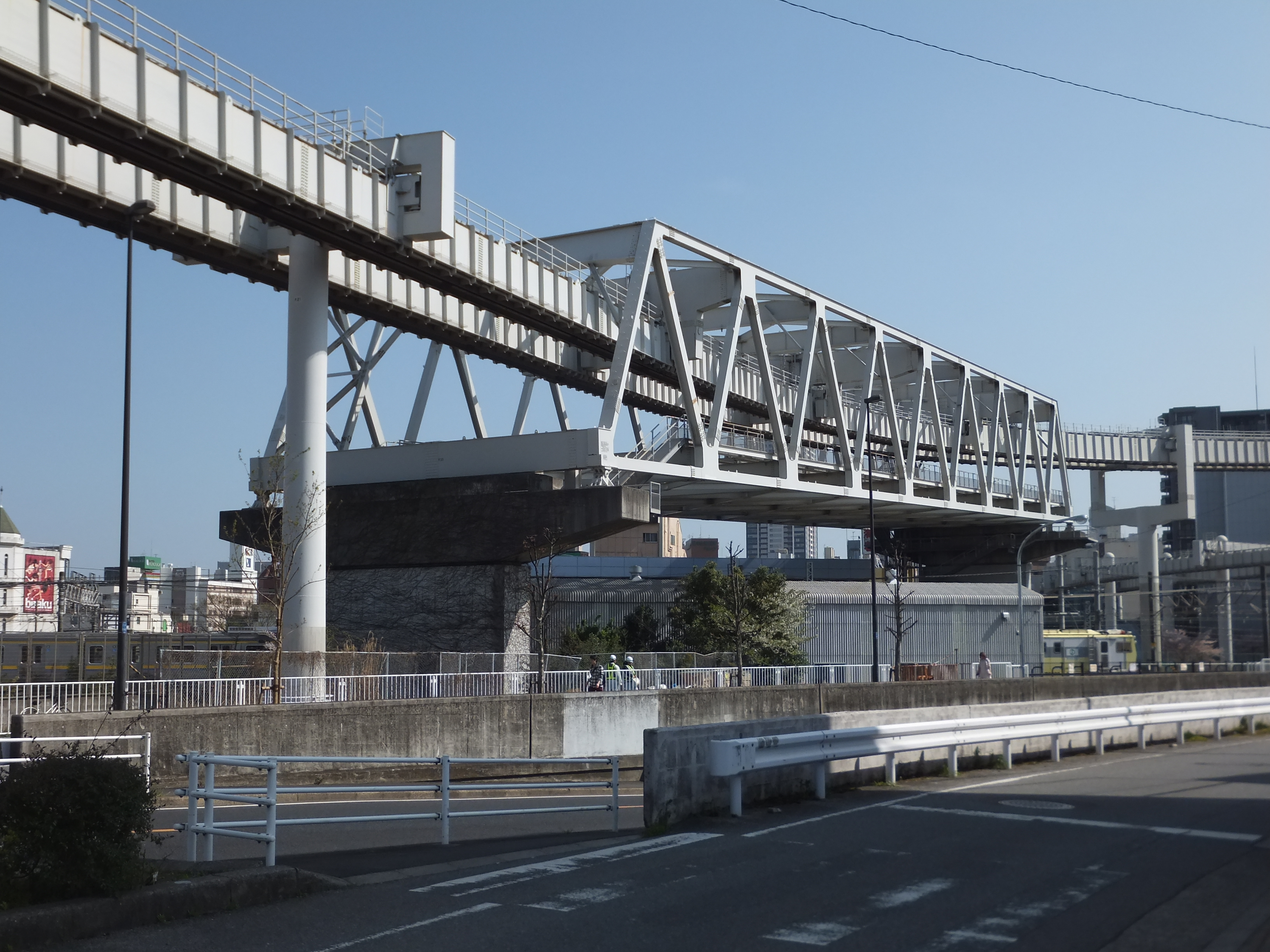 千葉都市モノレール2号線千葉～千葉公園間に架かるトラス橋。JR総武本線（千葉～東千葉）を跨ぐ。